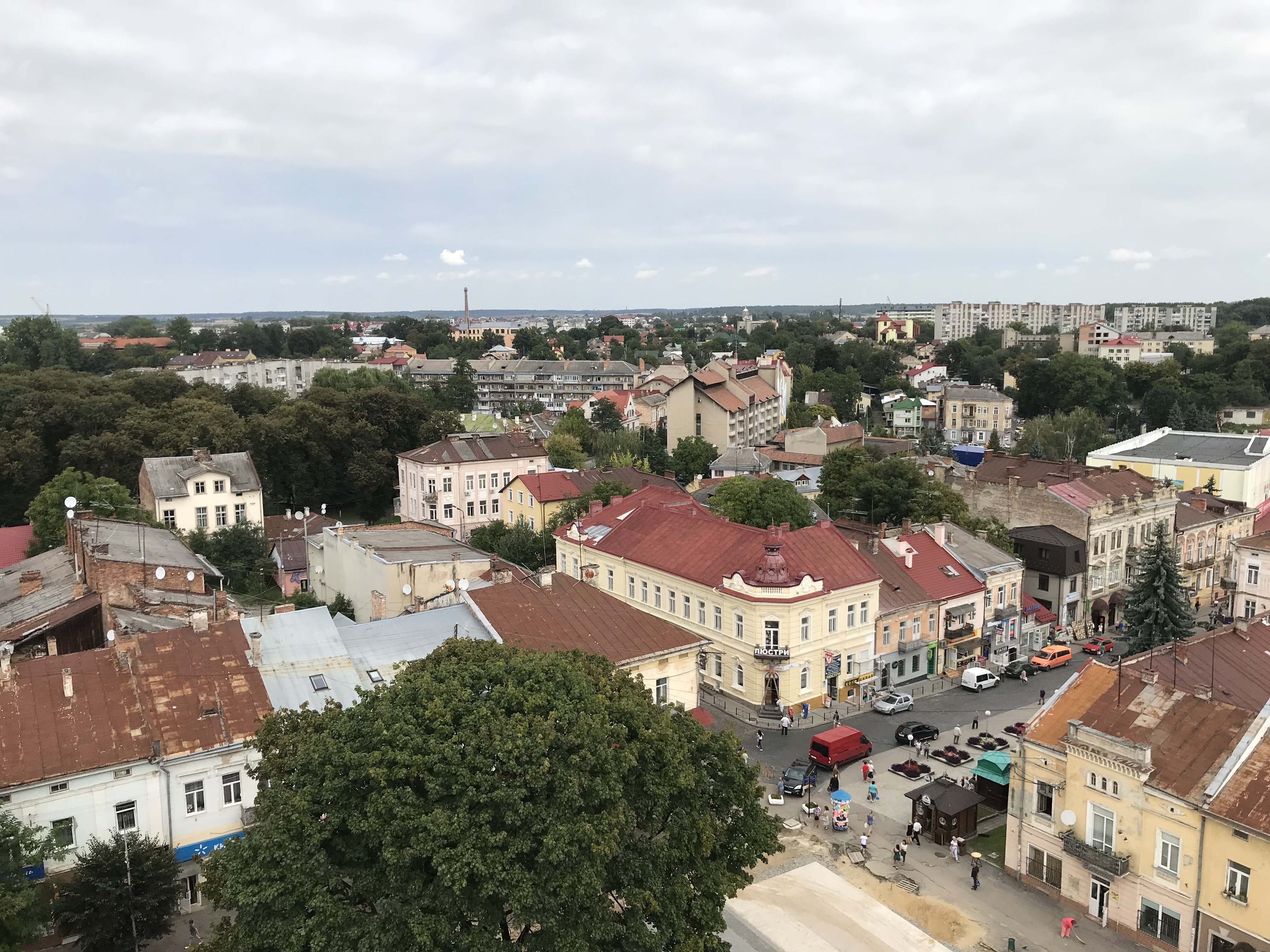 Вигляд з ратуші на площу Ринок